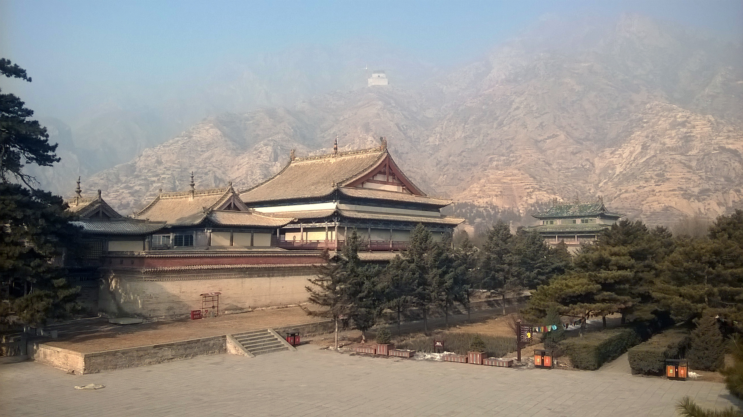 美岱召城墙上遥见大雄宝殿与琉璃殿。